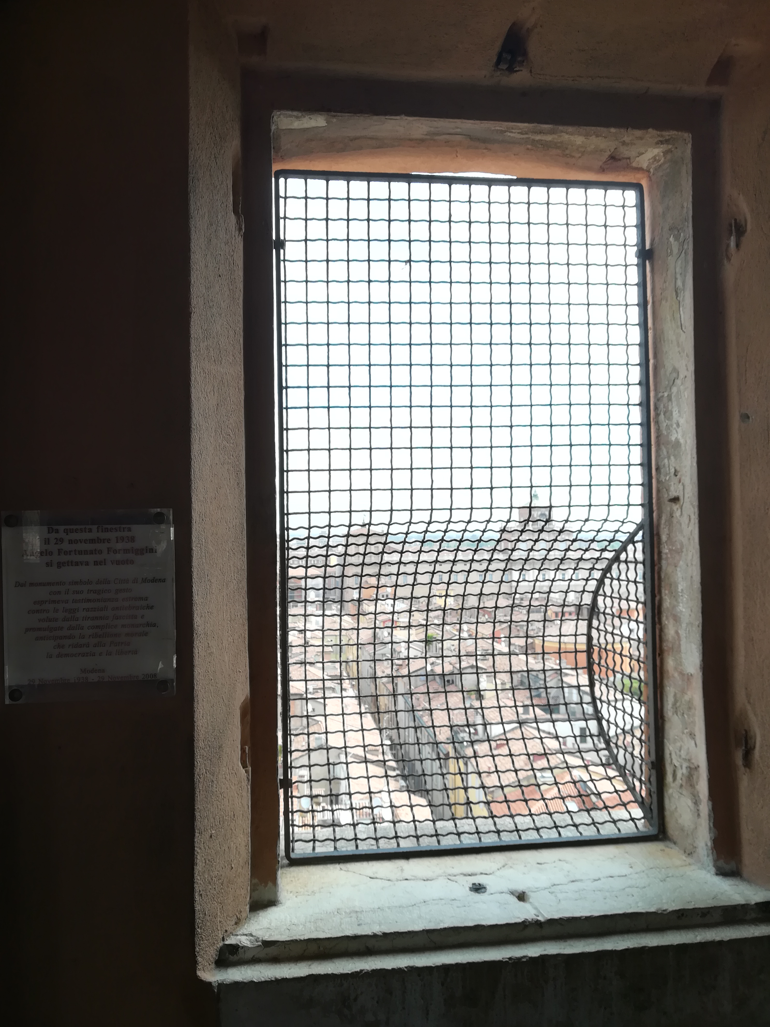 Interno della Ghirlandina (Modena)